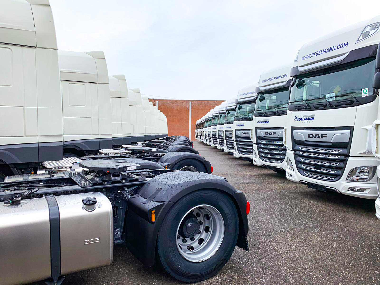 Hegelmann Group Flotte